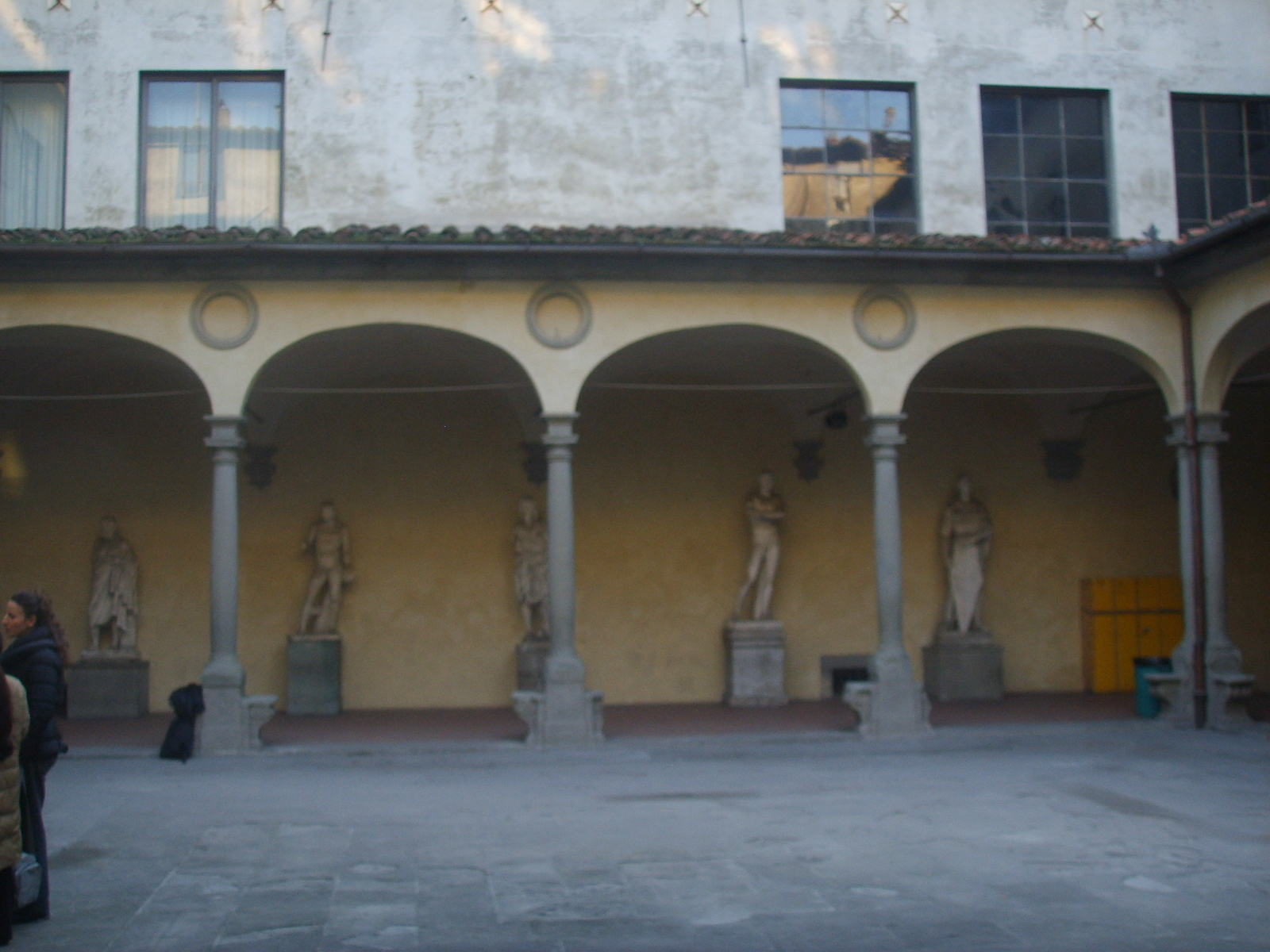 Accademia_di_Belle_arti courtyard in Florence, Italy